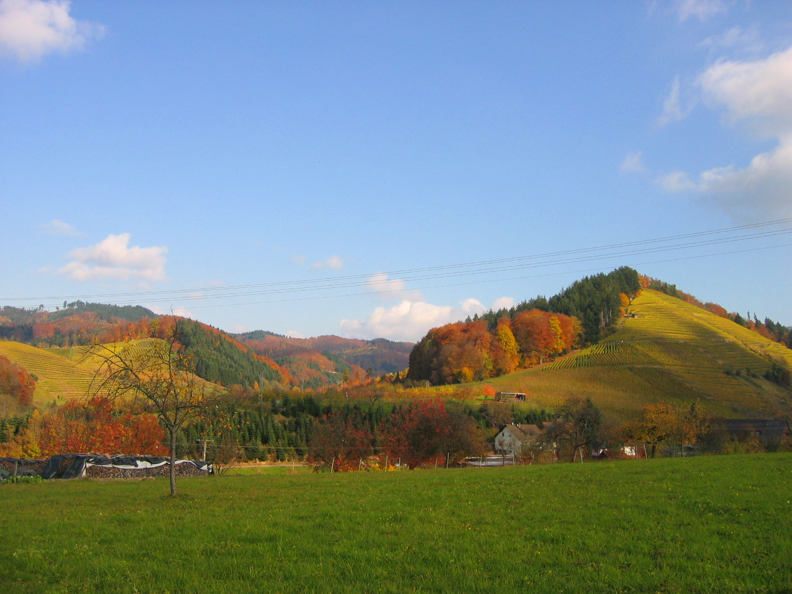 Reichenbachtal mit Blickrichtung zum Eichberg, Gengenbach, Baden-Württemberg, Deutschland